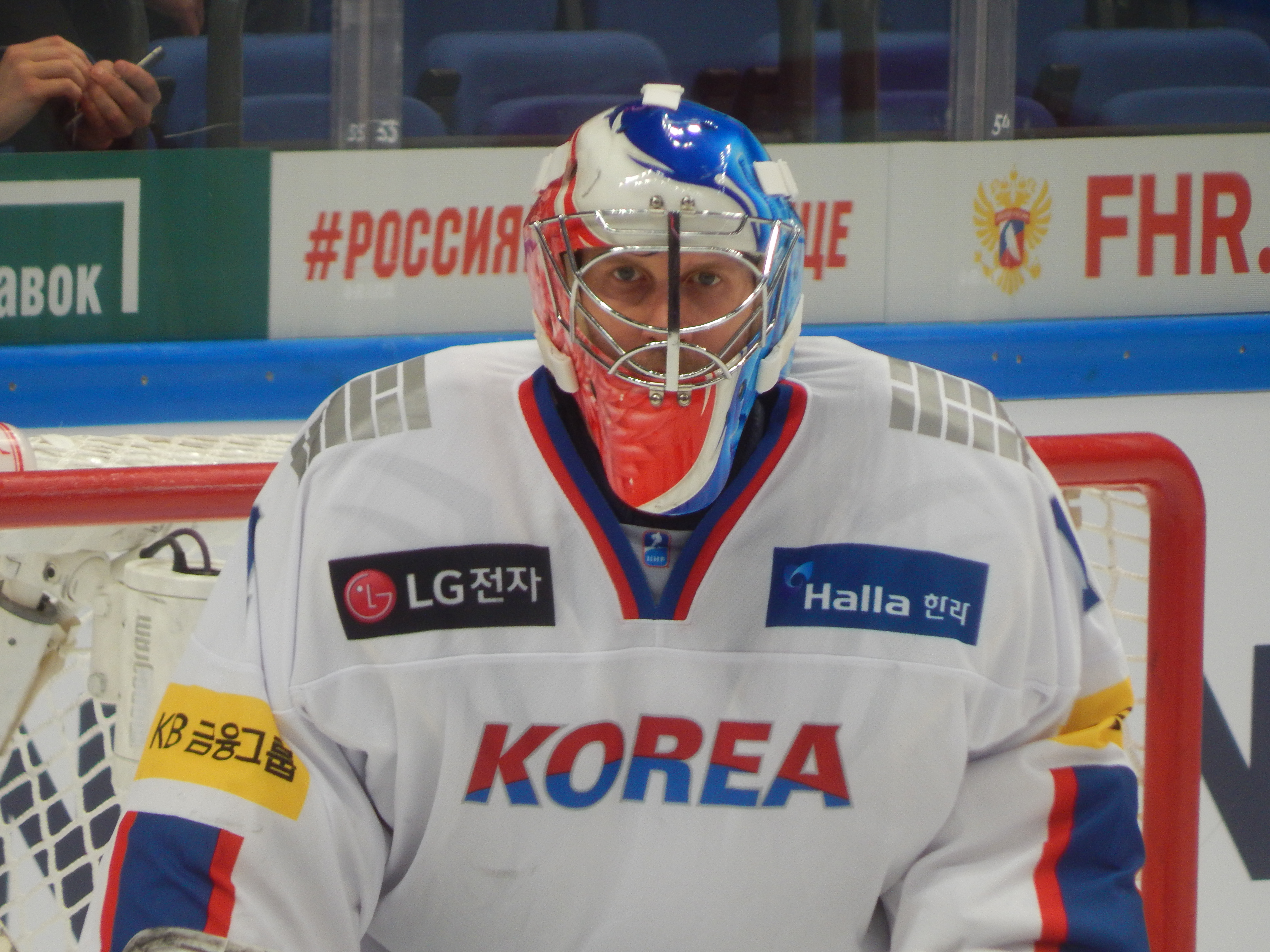 Кубок Первого Канала 2017, матч Канада - Южная Корея (13 декабря 2017) #1 DALTON,Matthew (KOR)